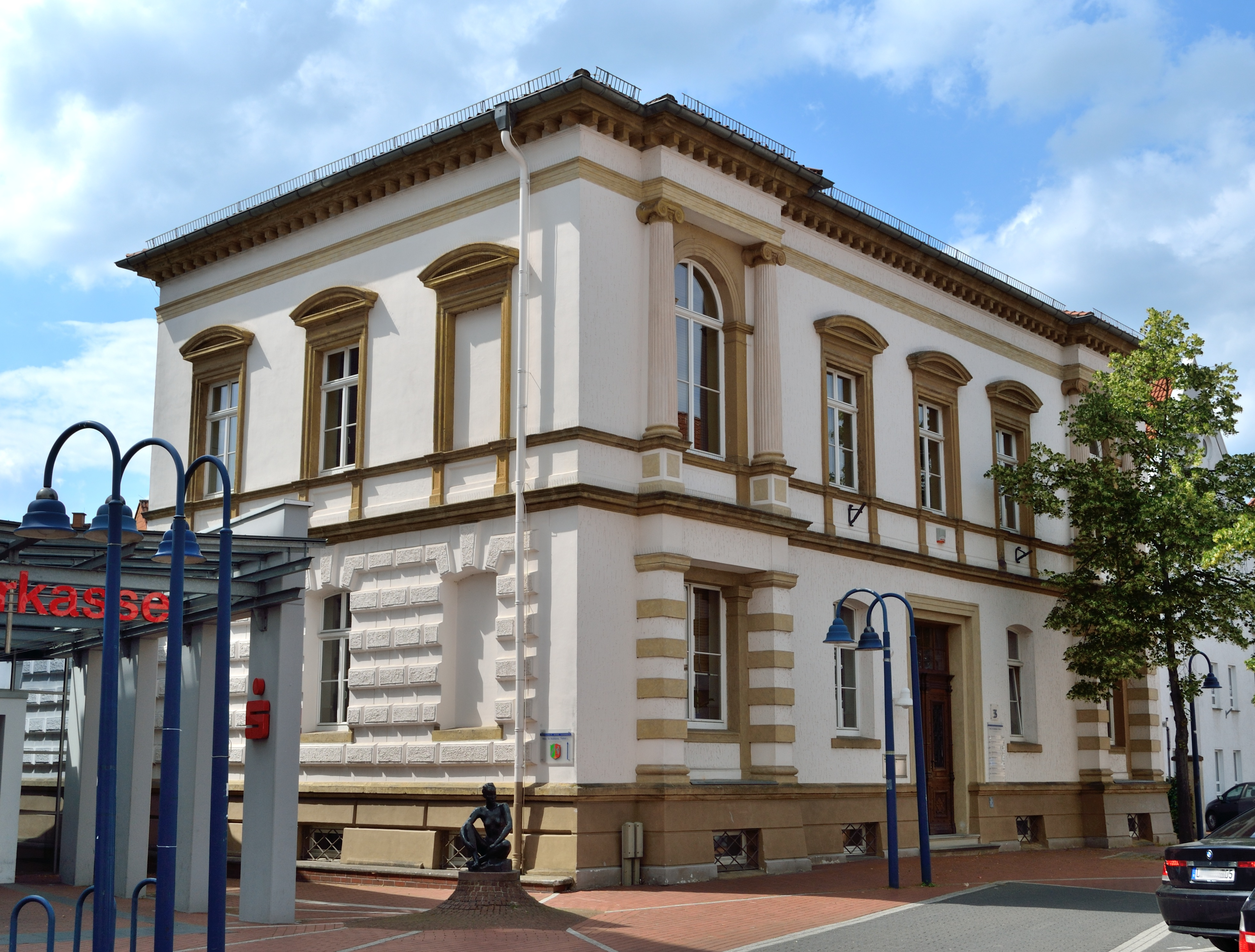 Ehemaliges Amtsgericht This is a photograph of an architectural monument.